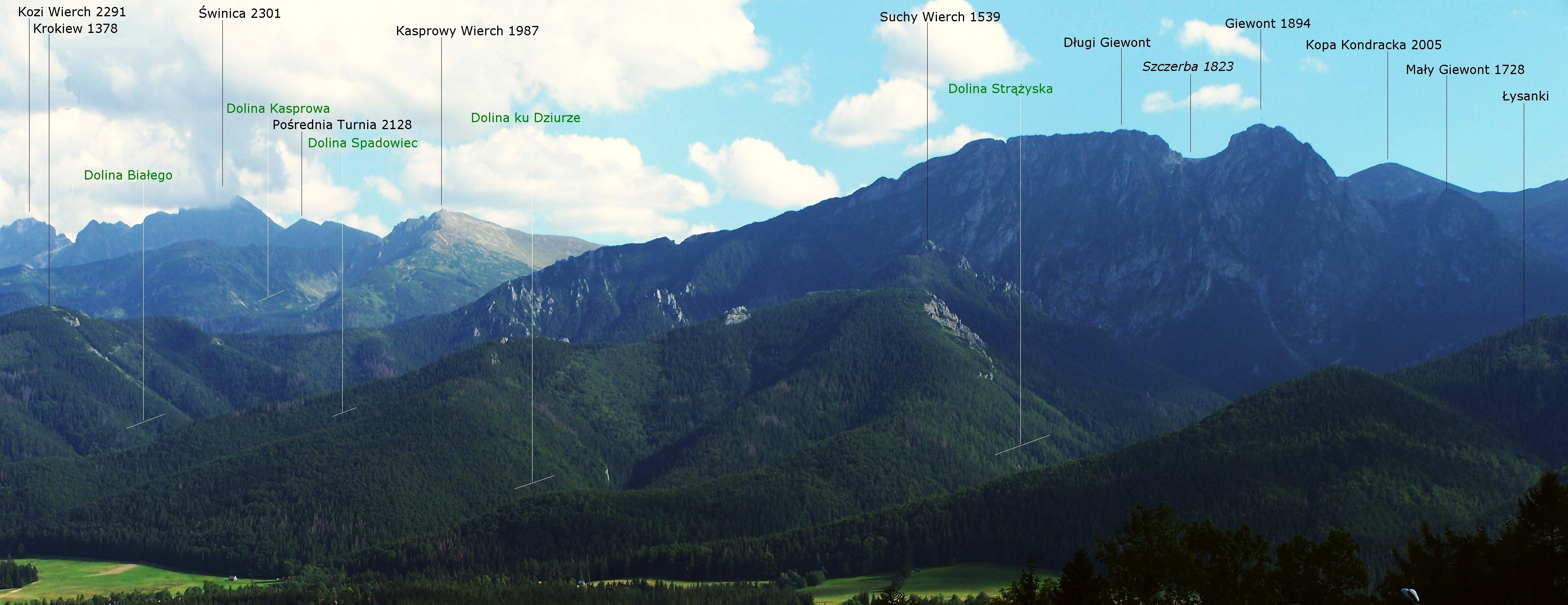 Widok z Butorowskiego Wierchu